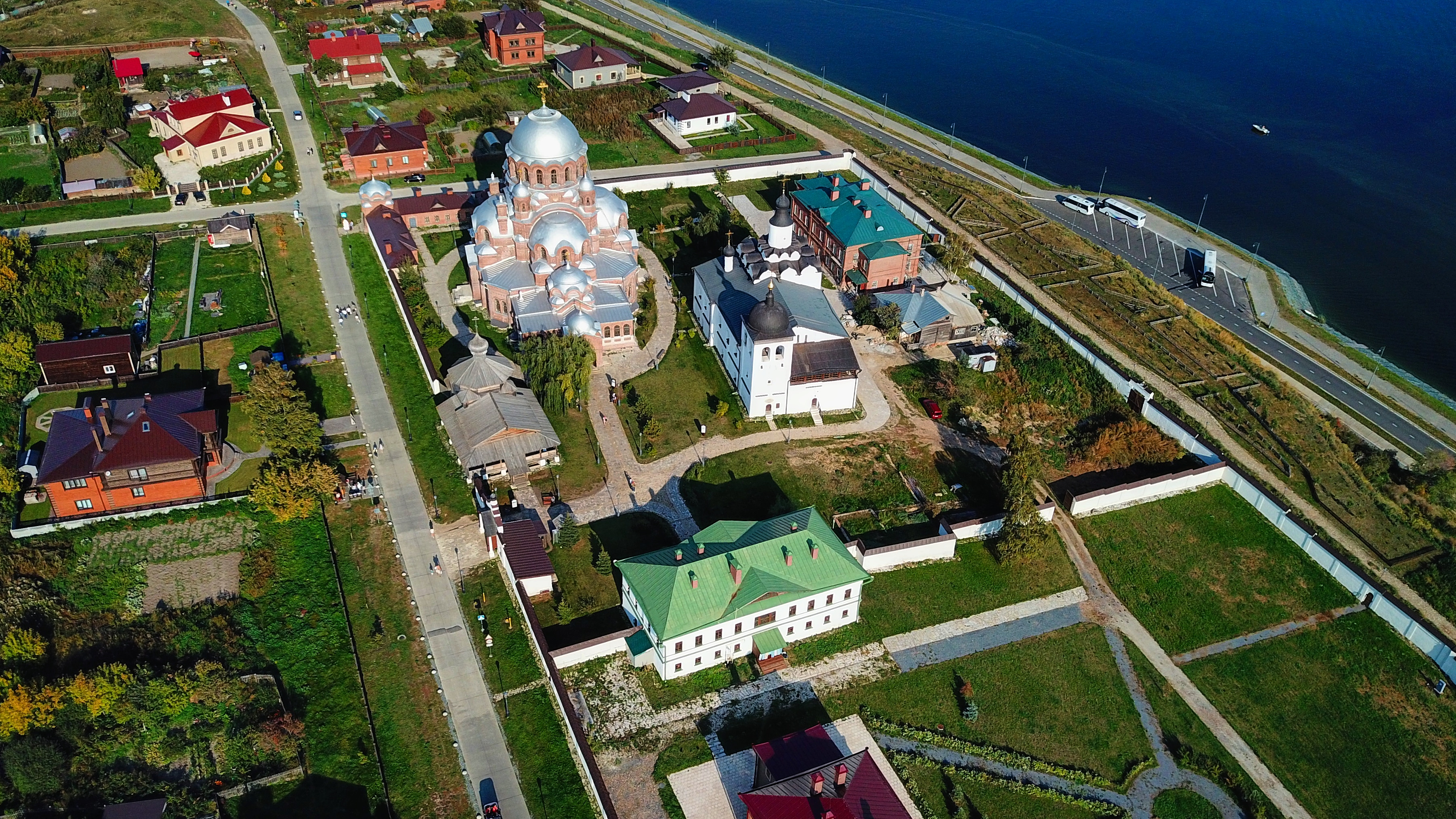 Свияжский Иоанно-Предтеченский монастырь коптер